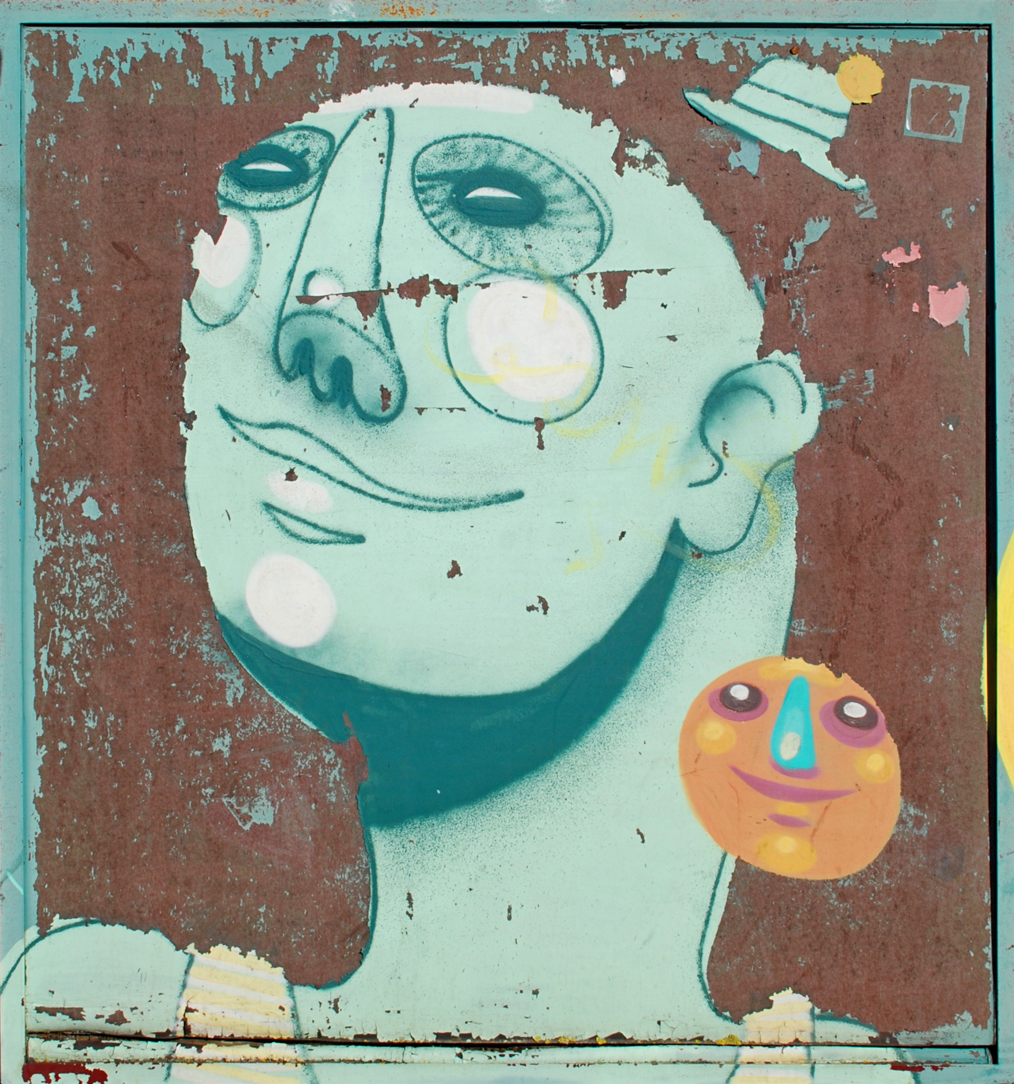 Belgique - Louvain-la-Neuve - Chemin des Lorrains (passerelle) - Fresques de Zësar Bahamonte (Kosmopolite Art Tour 2015 à Louvain-la-Neuve)